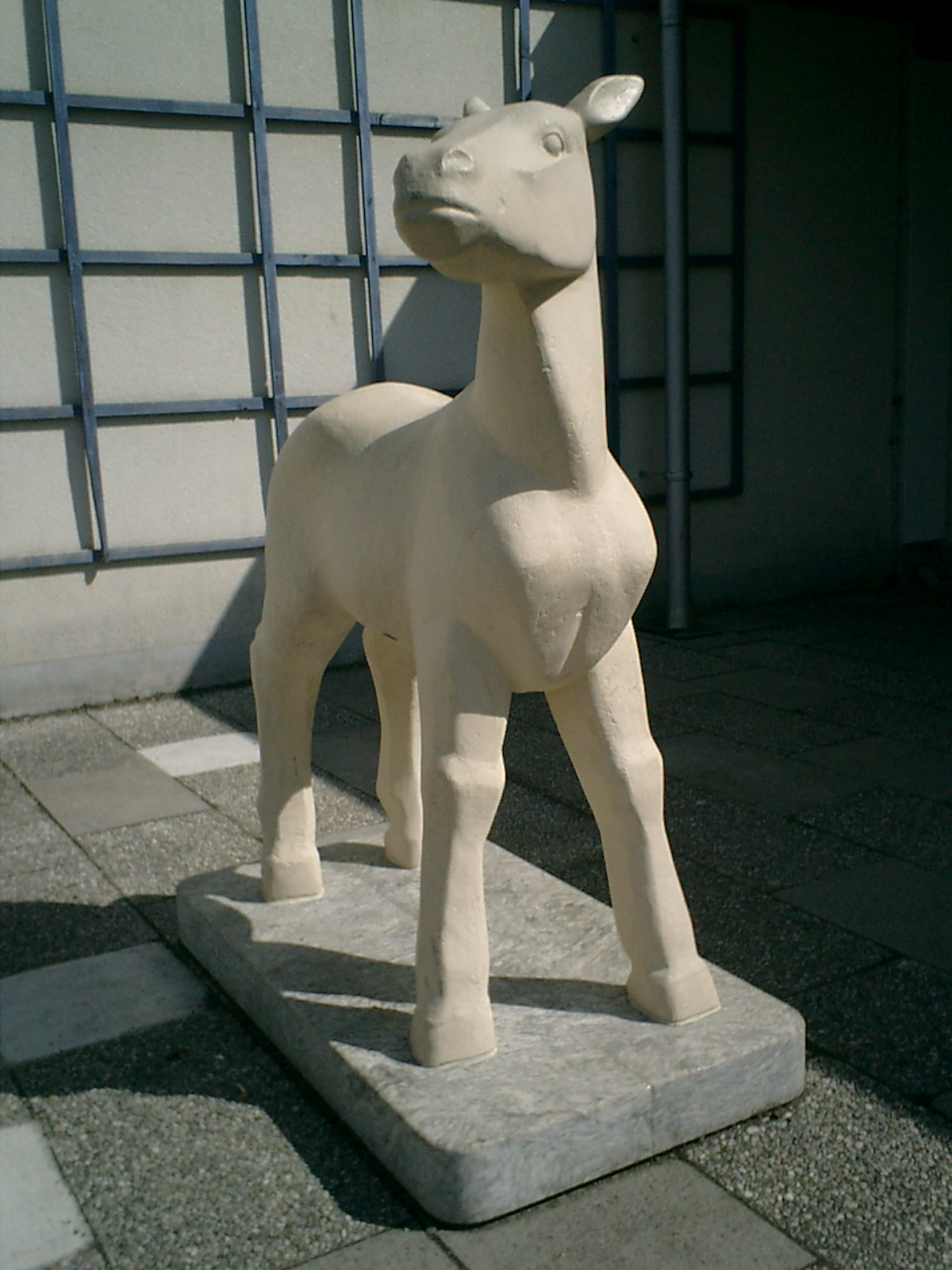 Eselstatue, ehemals vor der Hauptschule in Türkheim. andere Versionen: keine